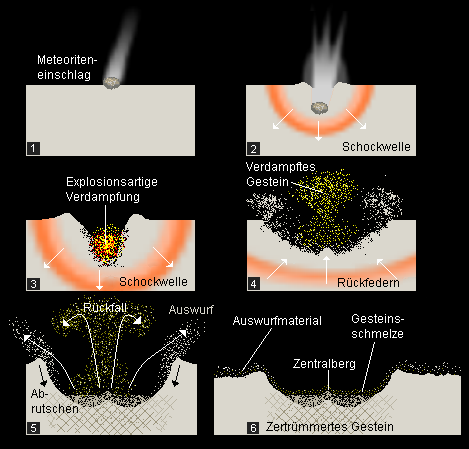 Impaktkrater